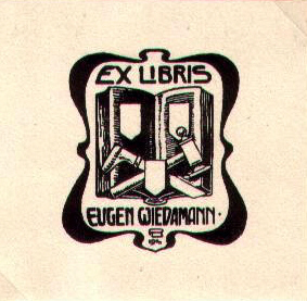 Ex Libris für Eugen Wiedamann